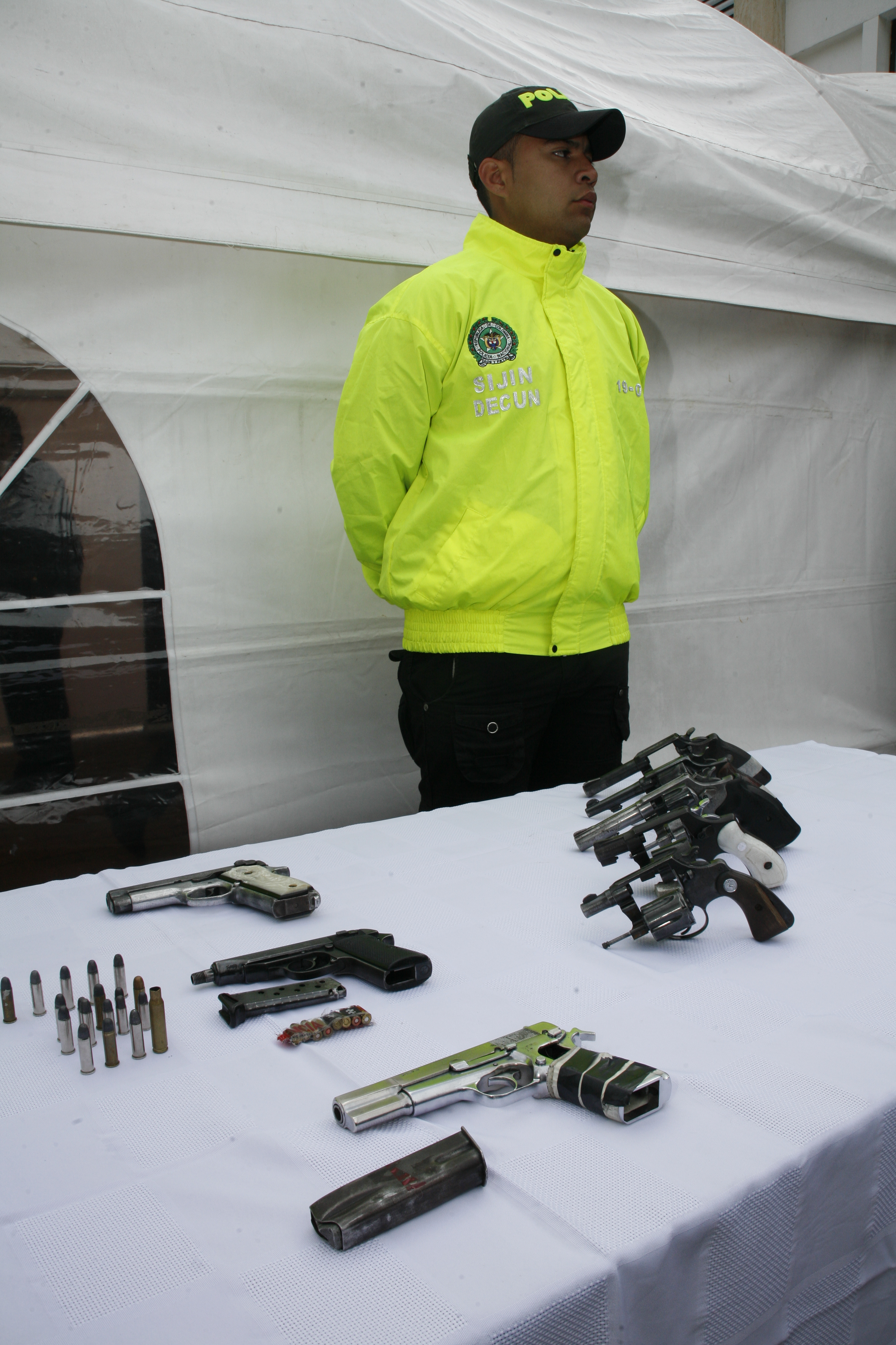 La organización delincuencial estaba conformada por nueve personas dedicadas al ‘Narcomenudeo’ e implicadas en por lo menos 18 ‘Homicidios selectivos’. Alias ”El Pollo o Samuel”, recluido en la cárcel de Fusagasugá, impartía órdenes a alias “Caquito” para ejecutar los homicidios selectivos. Estos sujetos pertenecieron a las Autodefensas Unidas de Colombia AUC. Esta banda delincuencial, está vinculada con el asesinato de una Edil de la localidad de Soacha el pasado 9 de abril del presente año. En los allanamientos, se les incautaron varias armas entre ellas un fusil calibre 7.62 y 22.500 dosis de estupefacientes.